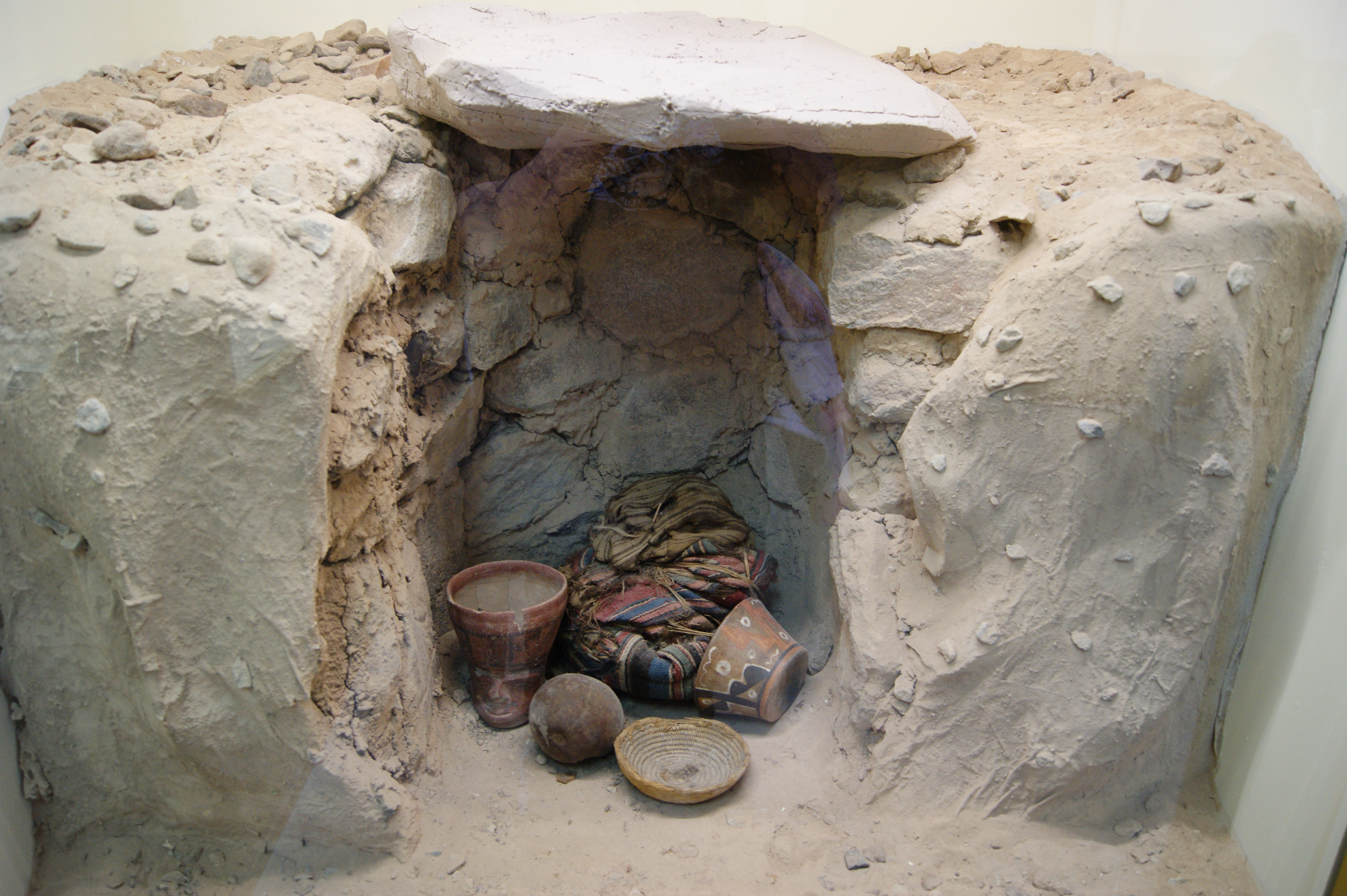 Modelo de una tumba. Museo Contisuyo, Moquegua, Perú.